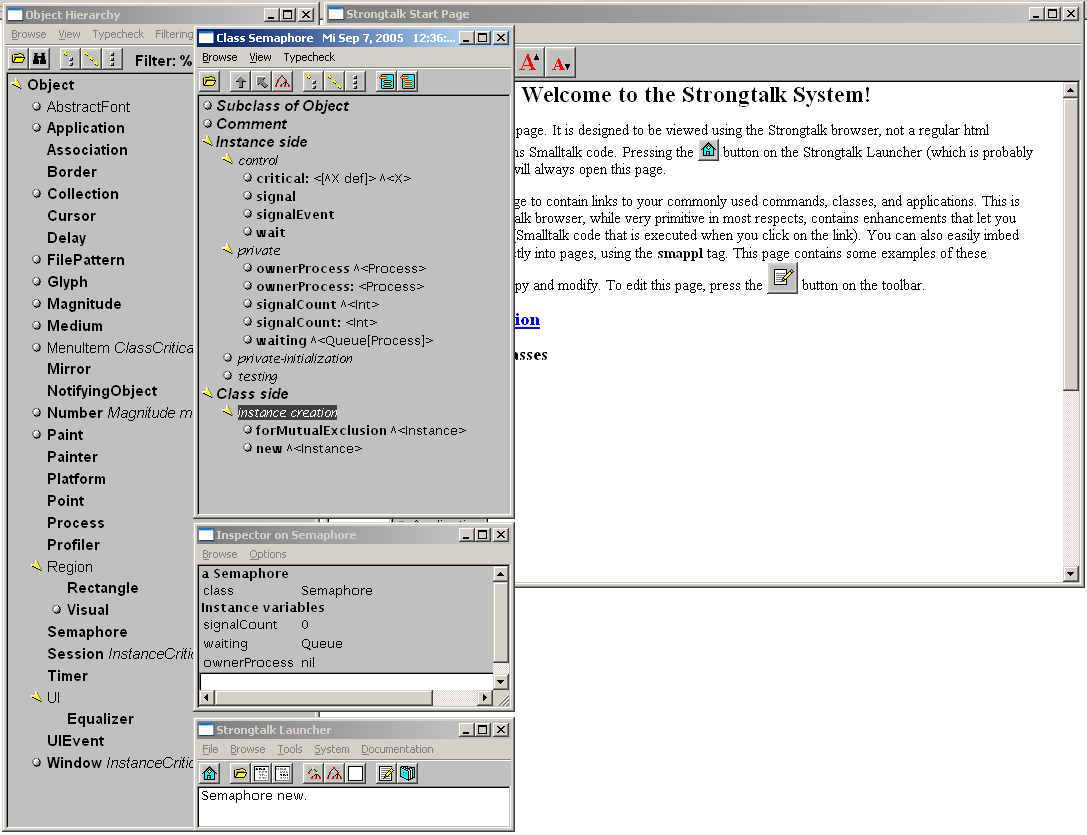 Das Strongtalk Entwicklungssystem im Überblick